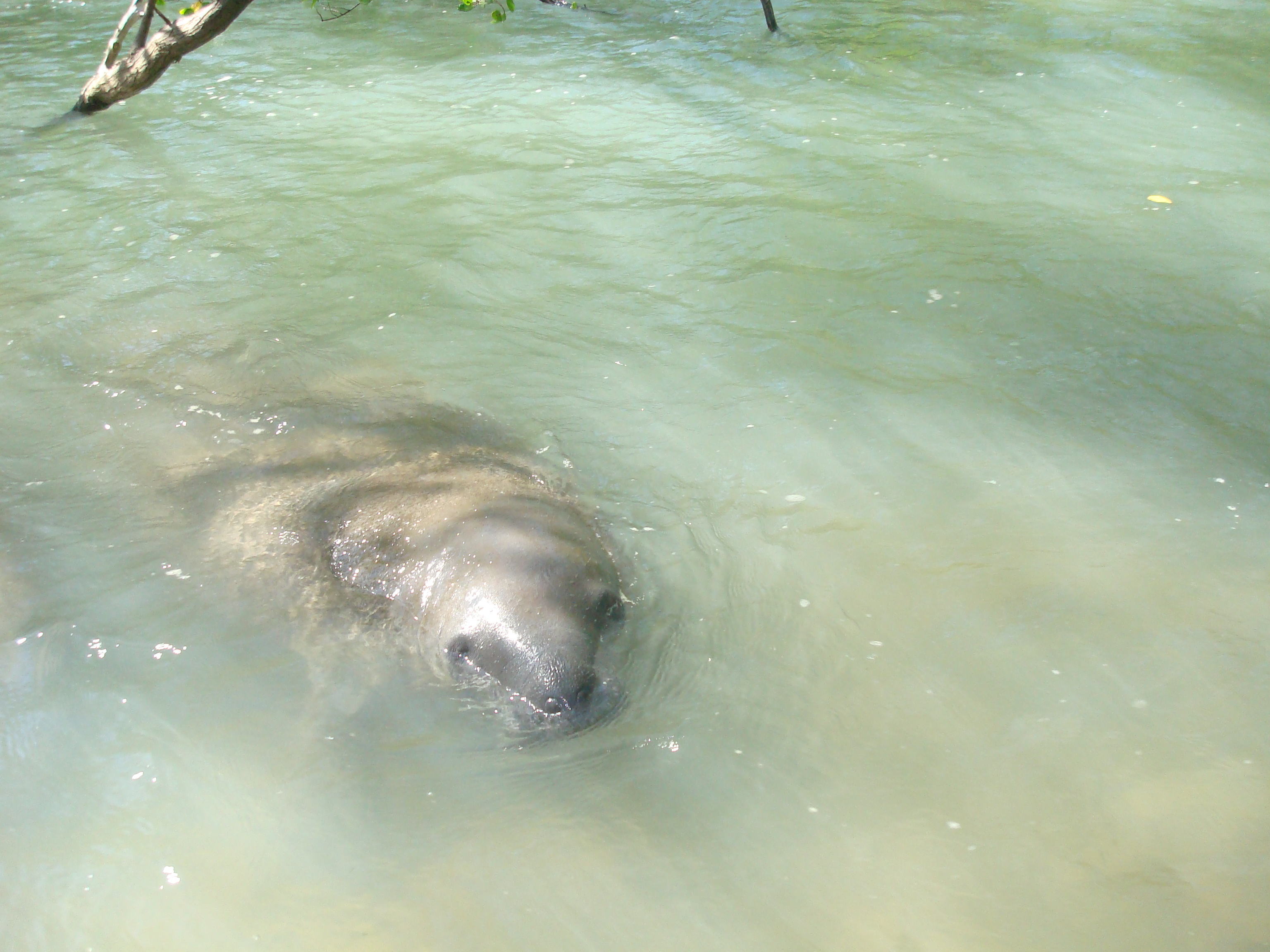 Um peixe bom muito bonito !